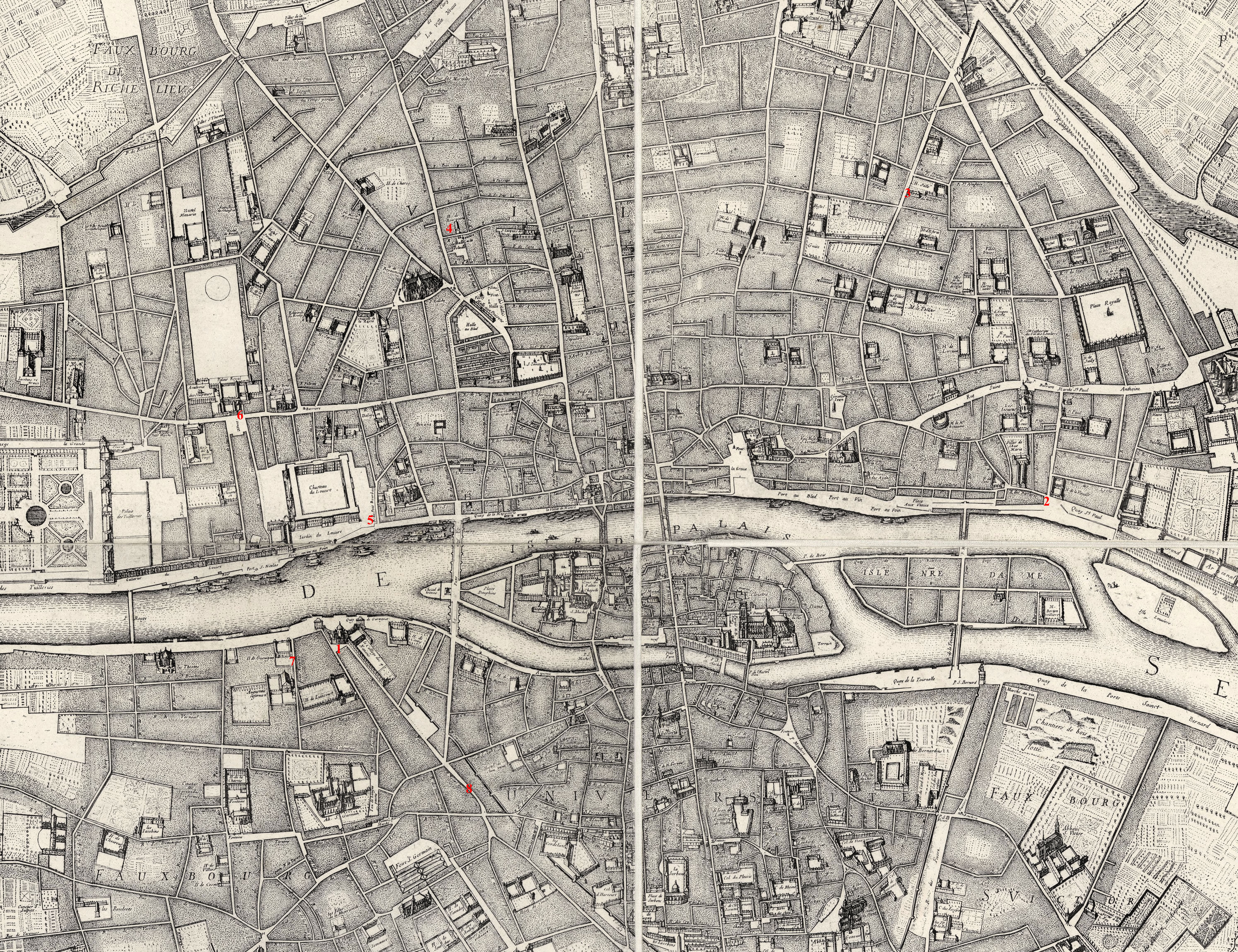 Plan de Paris par Jouvin de Rochefort (1672) Les salles de théâtres parisiennes au XVIIe siècle.